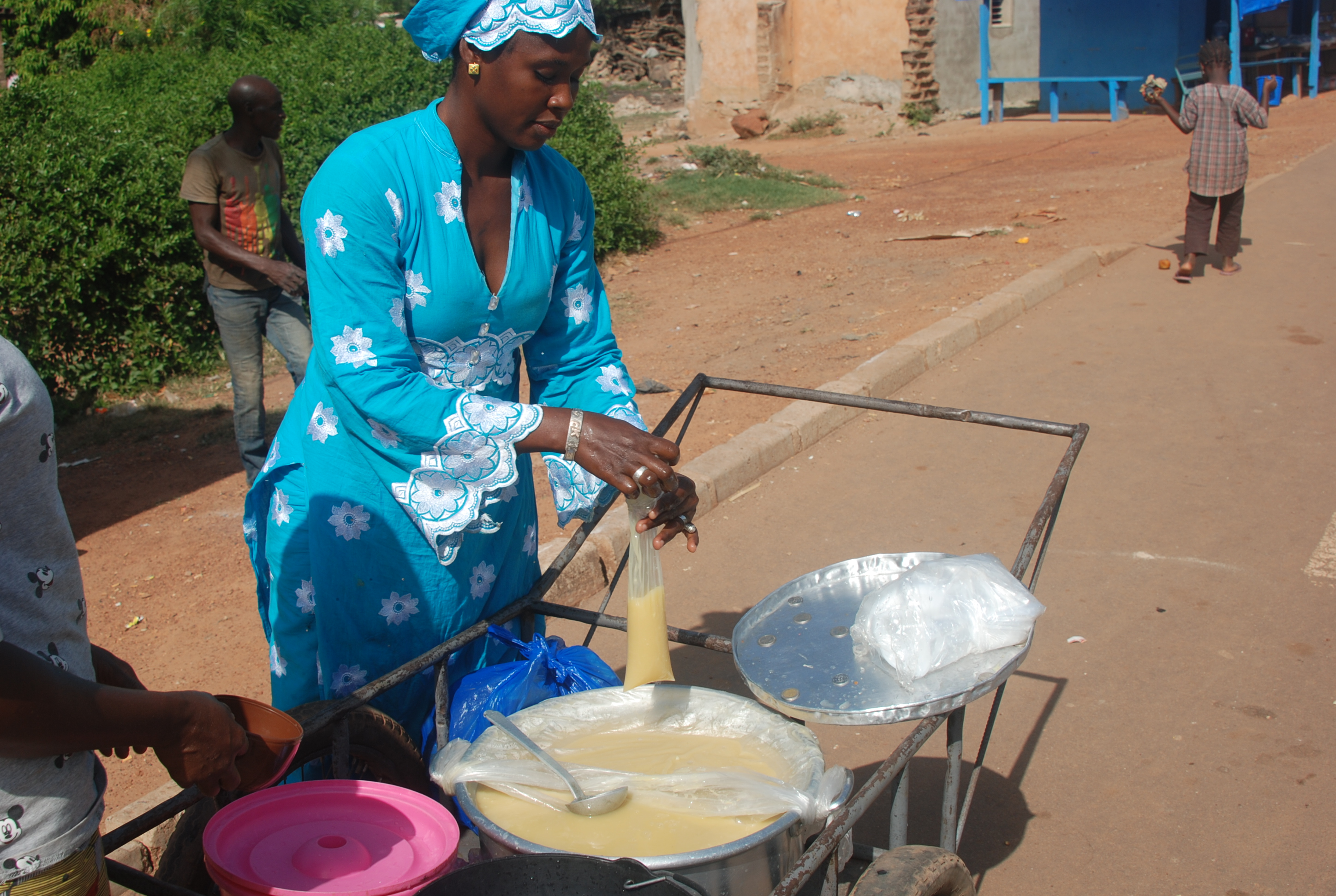 Une vendeuse de bouillie de mil en pleine journée de travail dans les rues de Ferké, une ville située au Nord de la Côte d'Ivoire. La ville est à environ 600 km d'Abidjan, la capitale économique ivoirienne. This is an image of "African people at work" from Ivory Coast